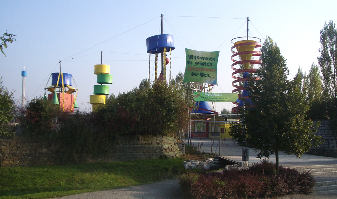 Meckenbeuren, Germany: Ravensburger Spieleland, entrance